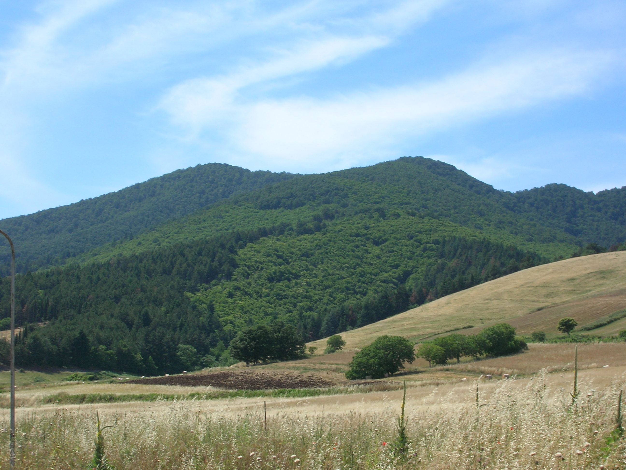 Veduta del Monte Vulture da Rionero (Basilicata)